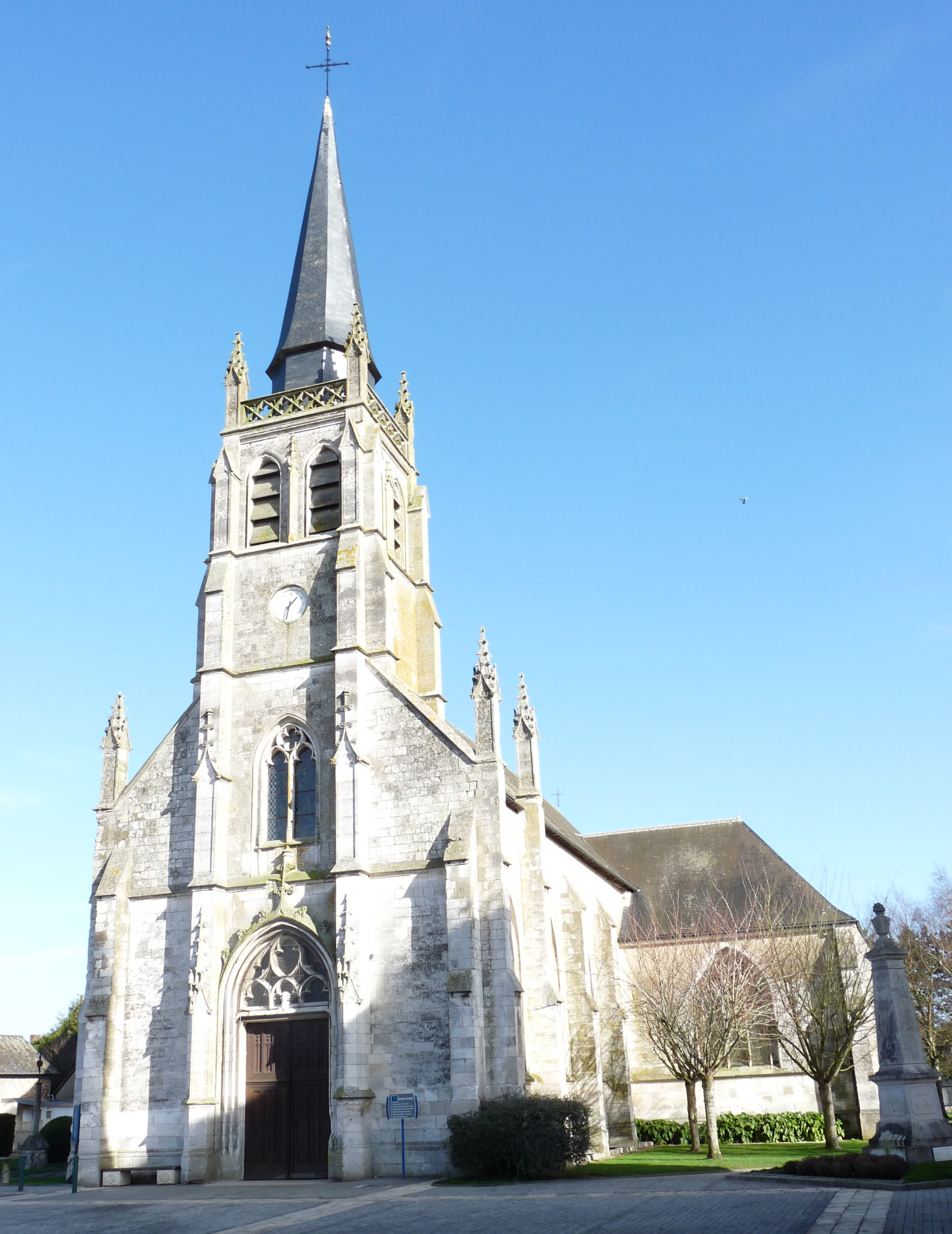 Église Saint-Lô de Bourg-Achard